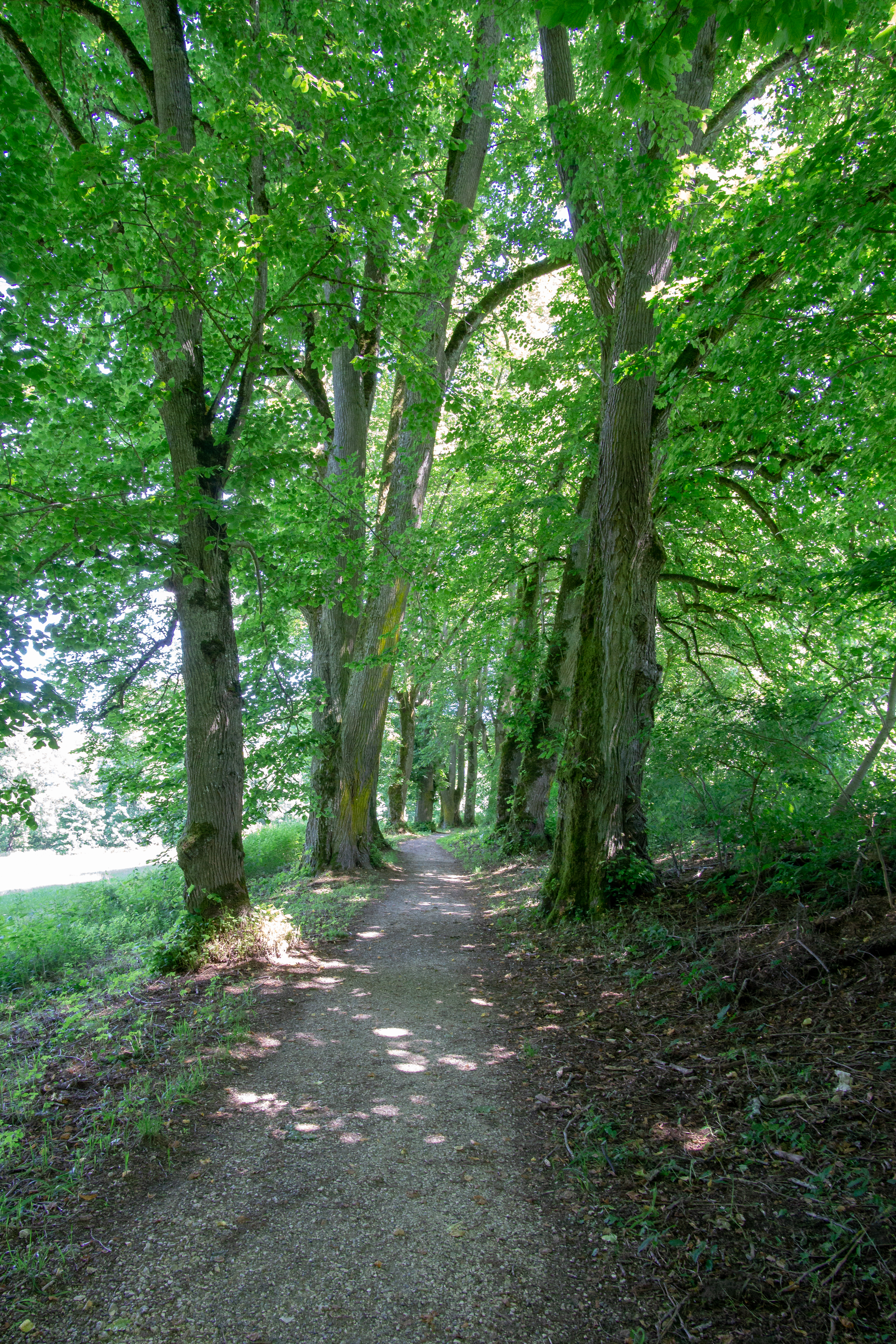 Fürstlicher Park Inzigkofen im Landschaftsschutzgebiet Donau- und Schmeiental LSG-Nummer 4.37.036